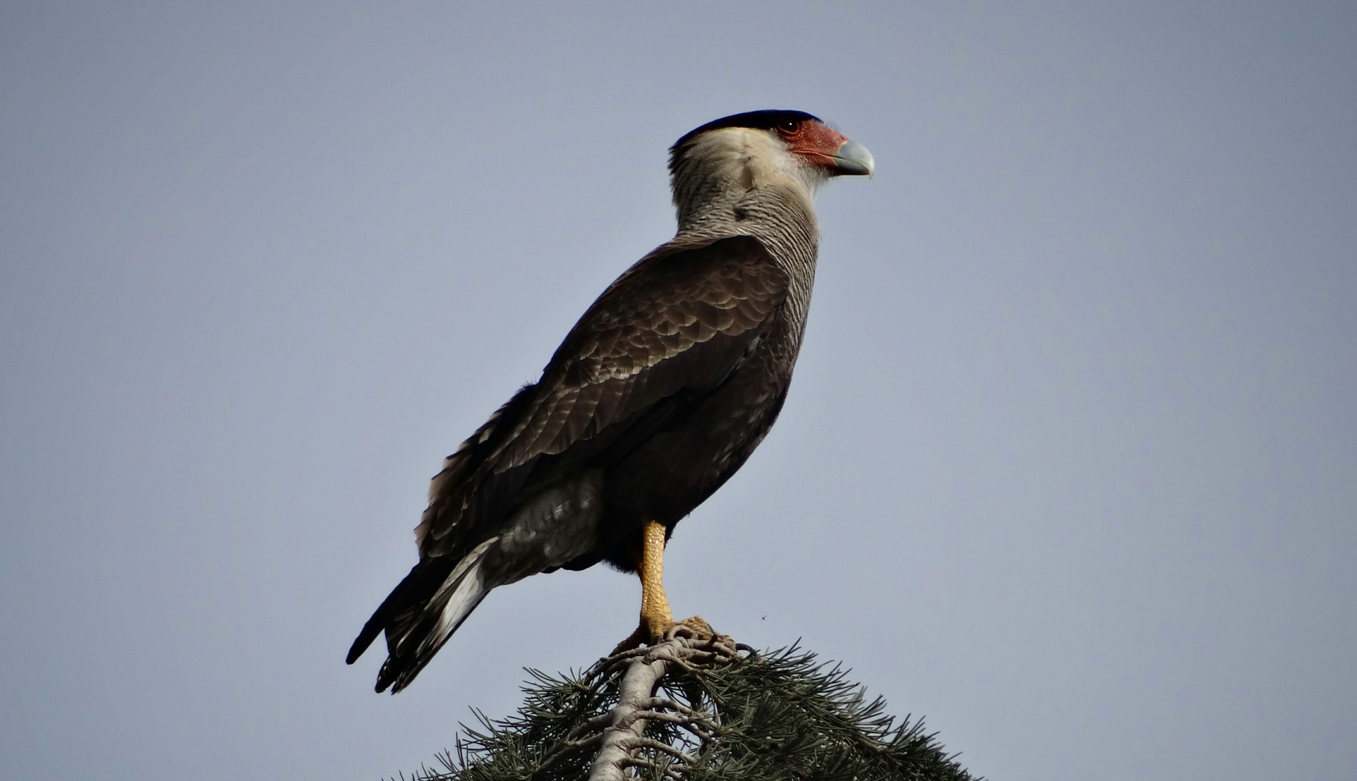 Carancho en la capital de la Provincia de Córdoba, Argentina.